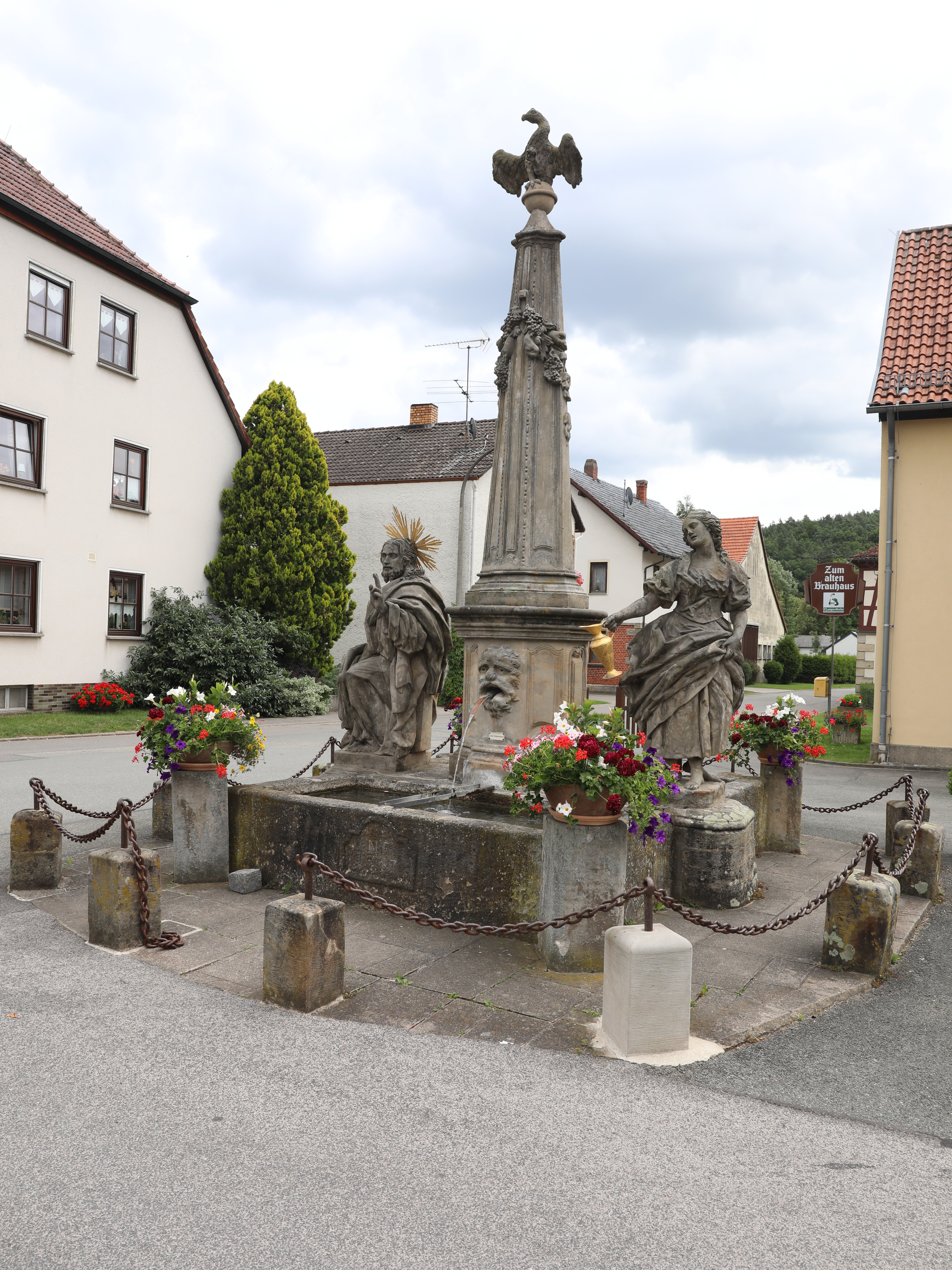 Dorfbrunnen in der Herrngasse in Neundorf, OT von Weitramsdorf, Lkr. Coburg